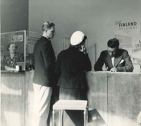 Mannerheimintien toimisto